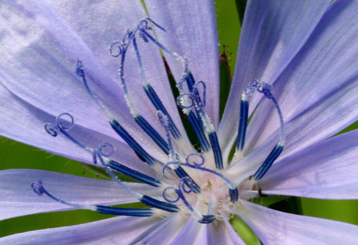 Cichorium intybus (Cicoria comune)